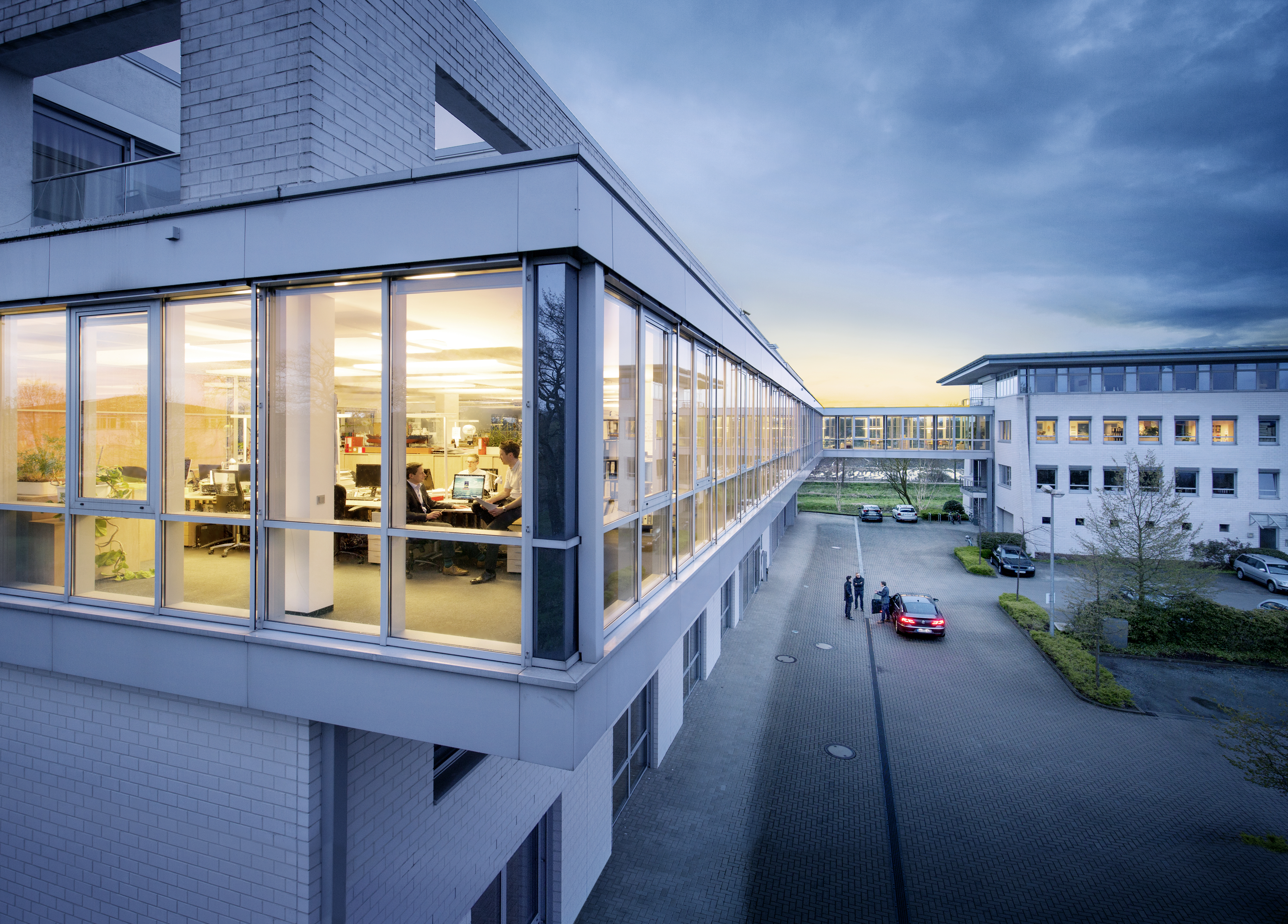 Harren & Partner headquarters in Bremen-Oberneuland